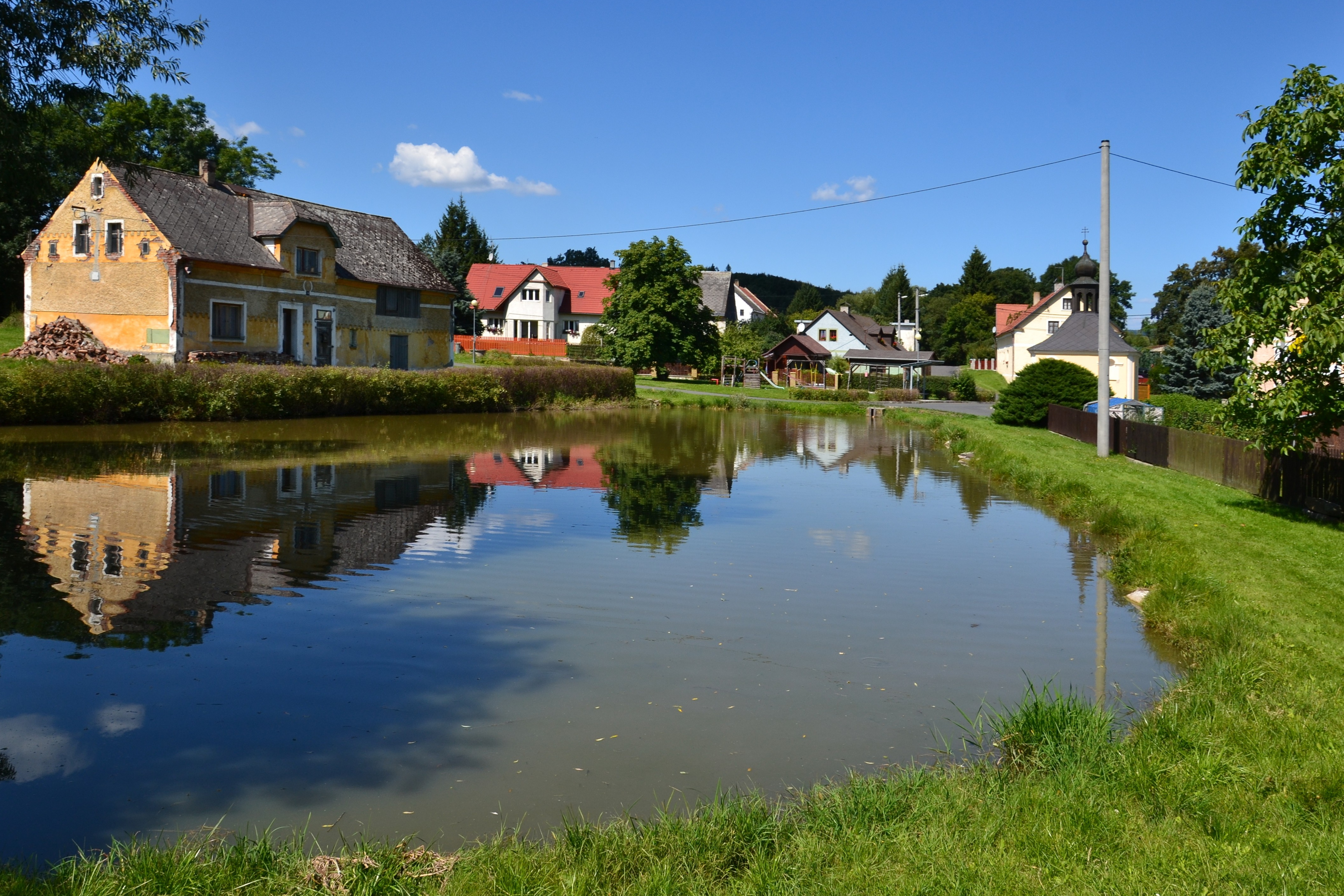 Návesní rybník